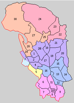 栃木県那須郡の町村。